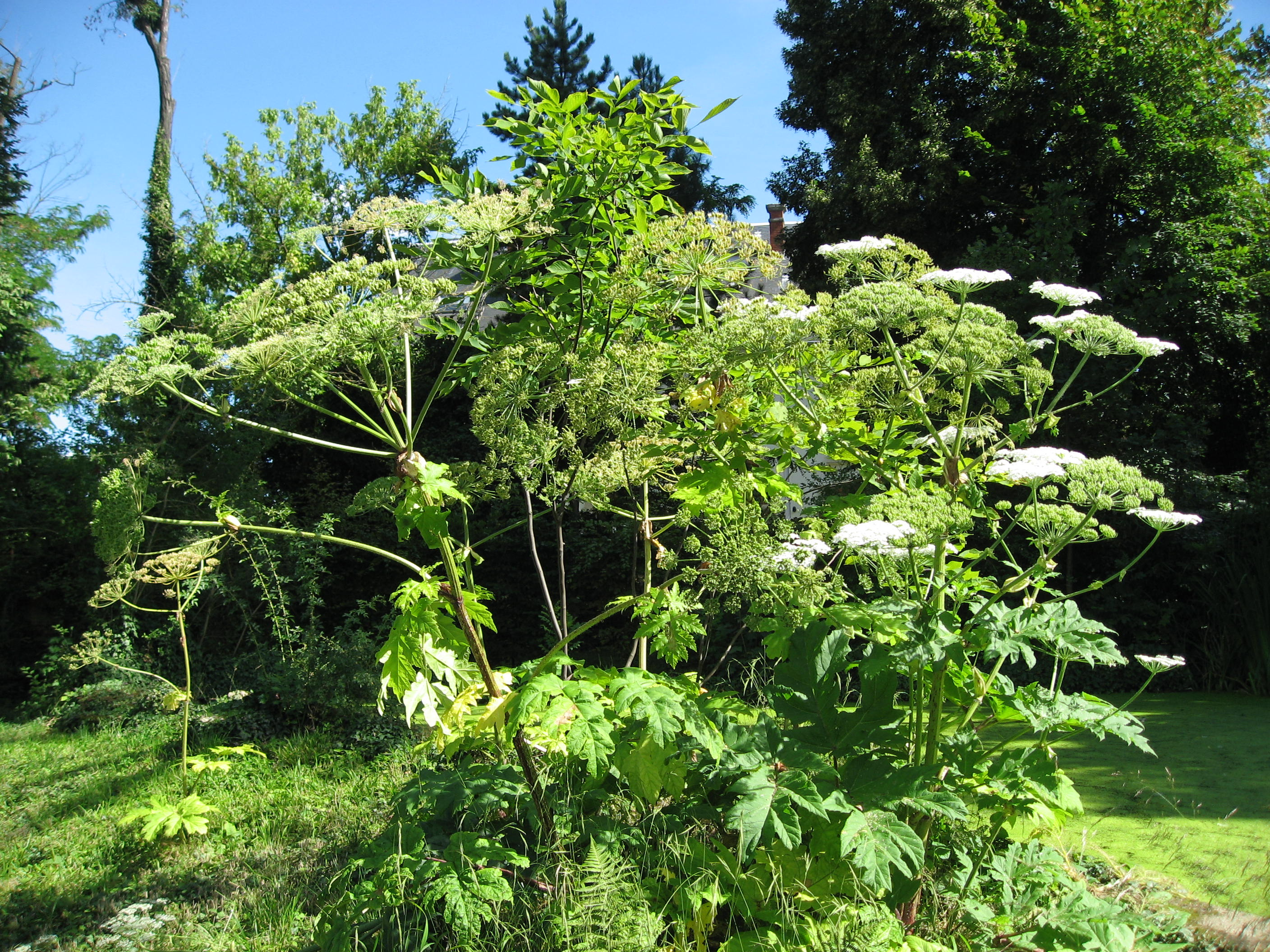 Heracleum mantegazzianum in Musée de l'École de Nancy Map: 48° 40' 49" N 6° 9' 57" E